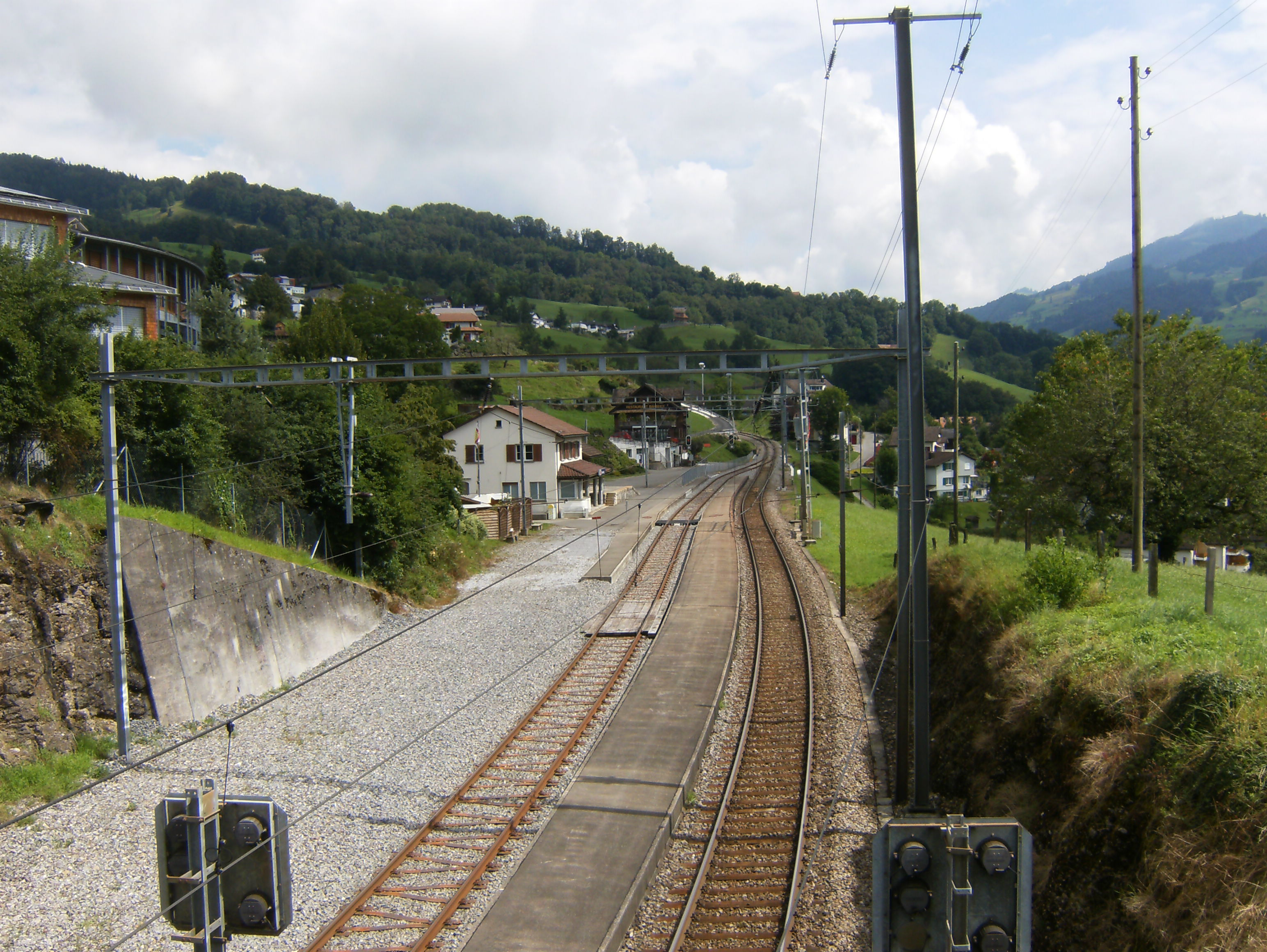 Bhf Steinerberg SZ